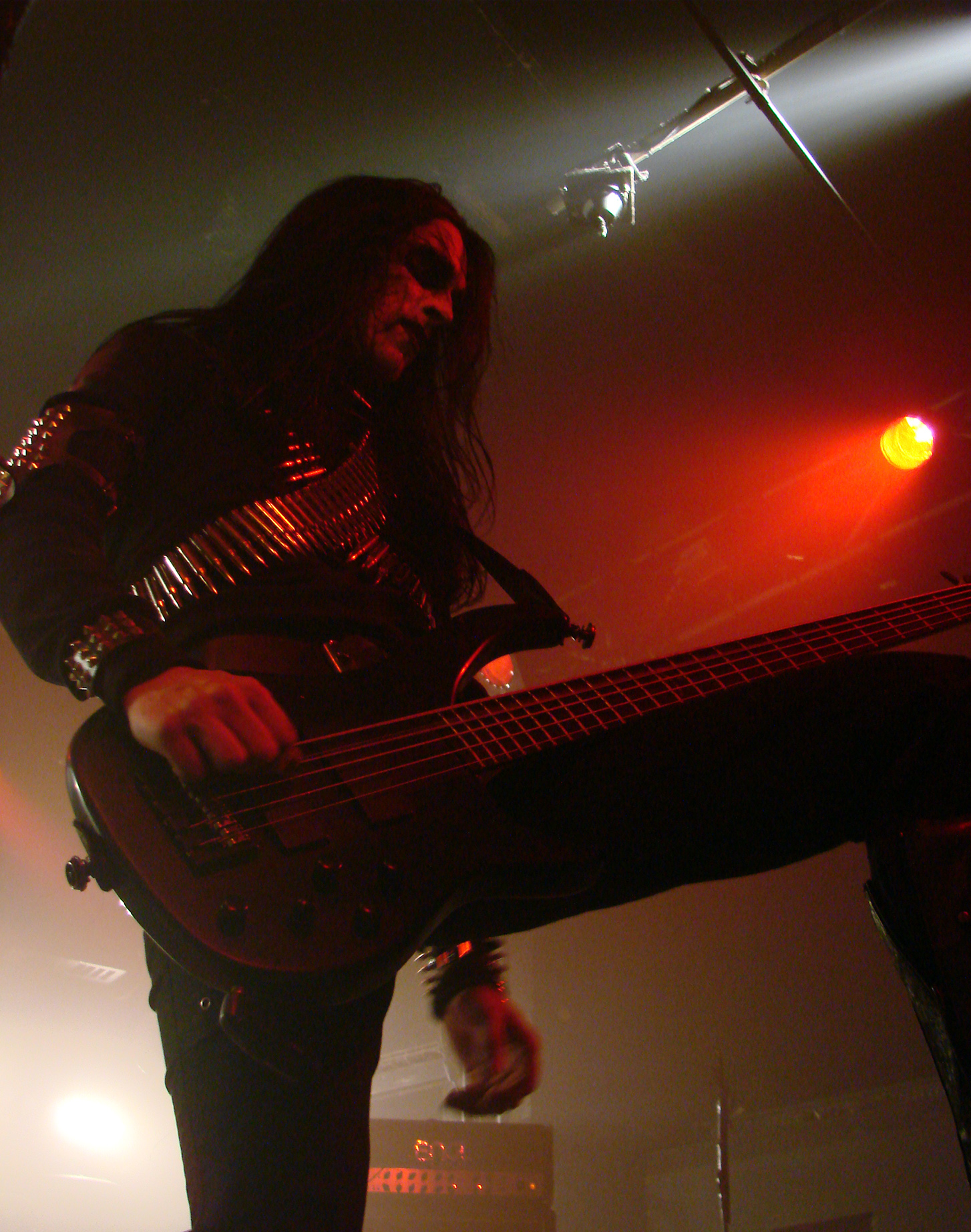 Gorgoroth, concert du 20/11/07 à la Locomotive à Paris.King ov Hell.